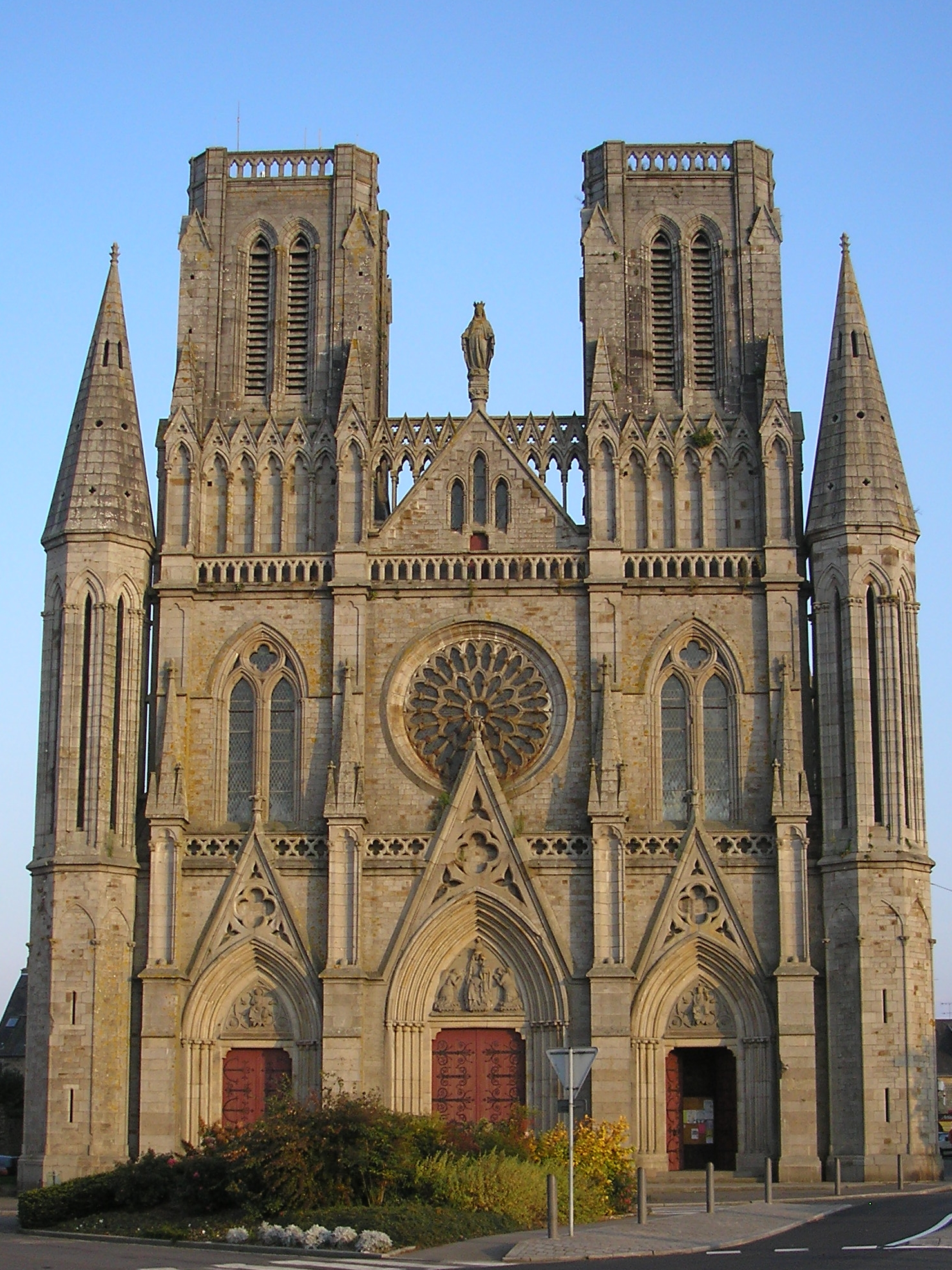 Avranches (Normandie, France). L'église Notre-Dame des Champs.